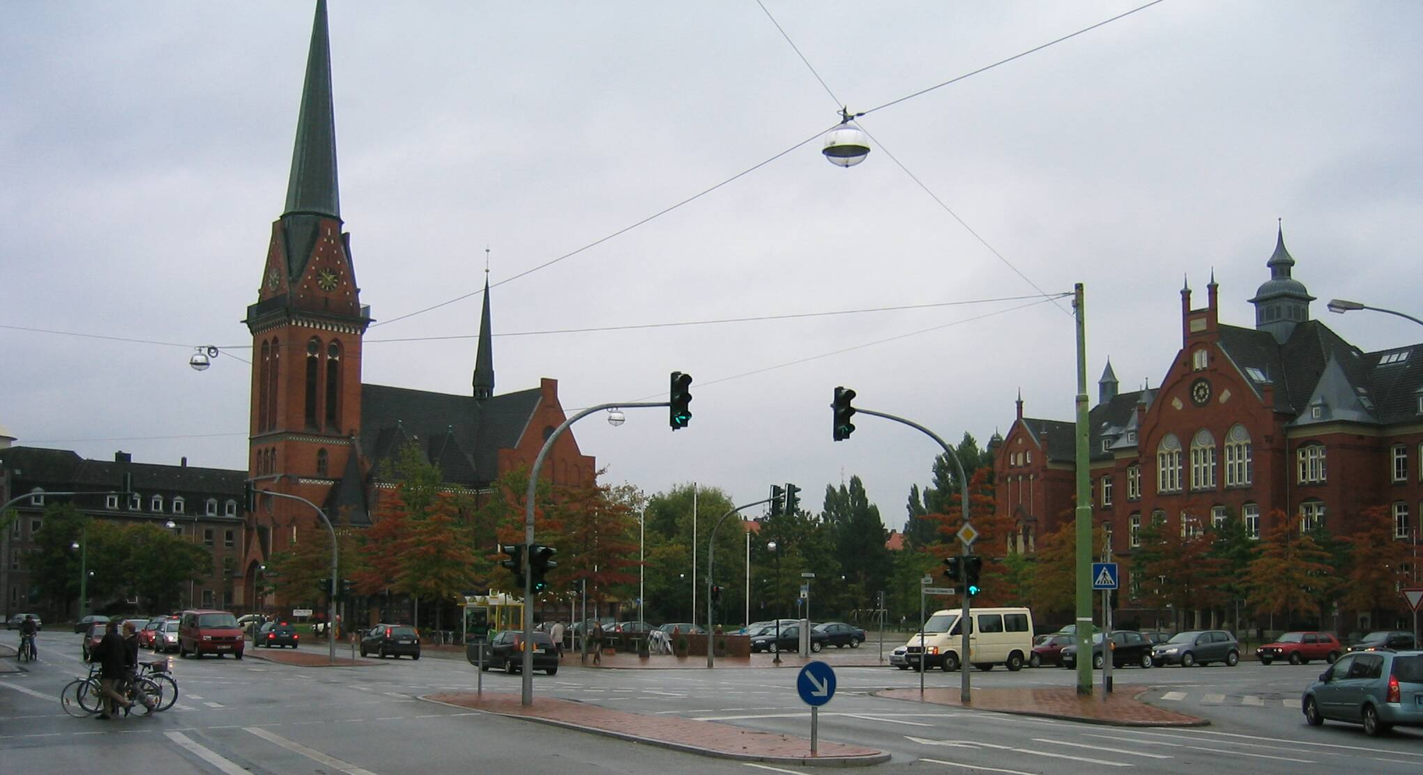 Lehe: Lessingschule (inzwischen in Schule am Ernst-Reuter-Platz umbenannt) und Pauluskirche am Ernst-Reuter-Platz, alle drei im Rahmen von Urban II renoviert. Nach links hinten: Hafenstraße, nach rechts: Melchior-Schwoon-Straße Die Pauluskirche ist ein geschütztes Kulturdenkmal in der Freien Hansestadt Bremen, mit der Nr. 1570 beim Landesamt für Denkmalpflege registriert.